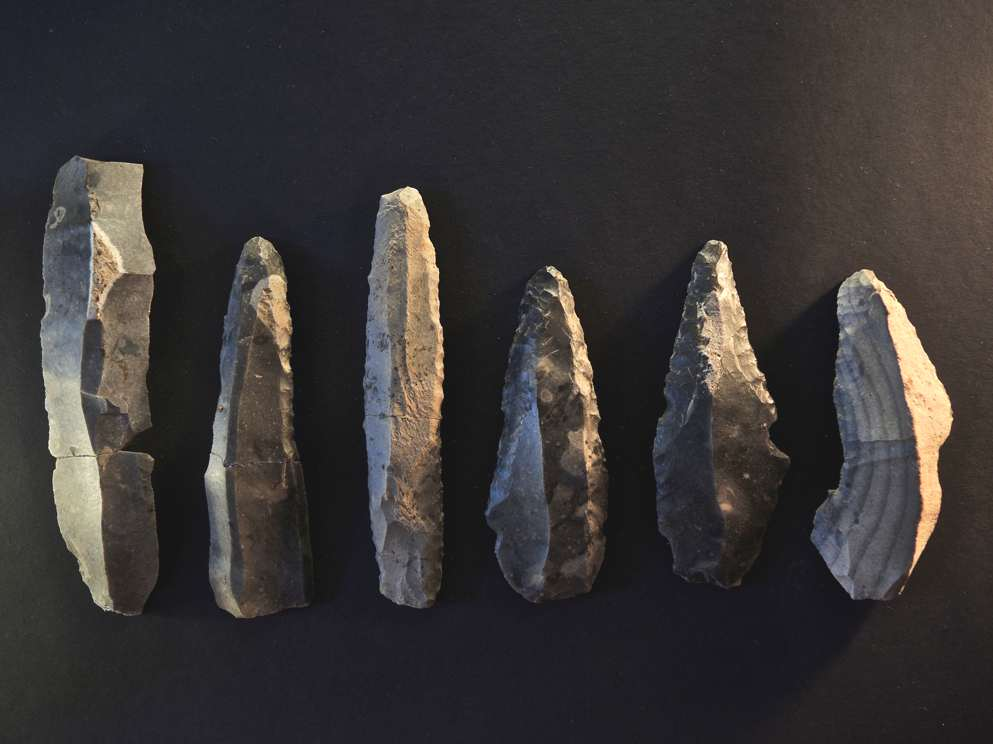 Fragment einer Großklinge (links. Länge noch 14.5 cm) mit Belegen verschiedener Klingengerätschaften aus Rijckholtfeuerstein (Niederlande), alle Artefakte aus Duisburg-Serm